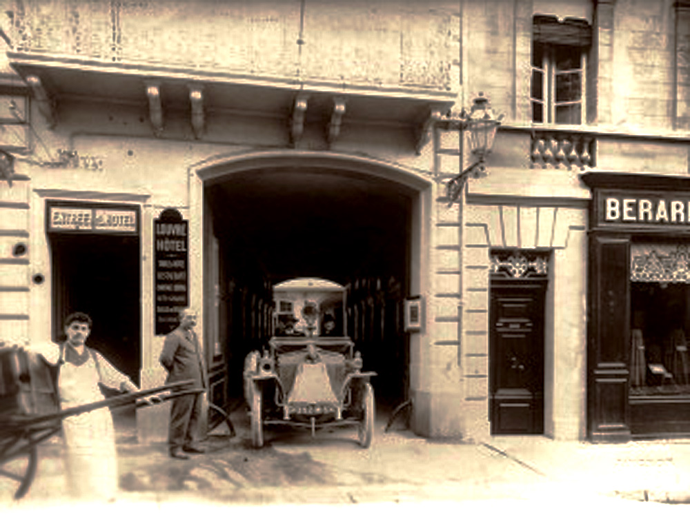 Garage privé de l"hôtel du Louvre, rue Saint-Agricol